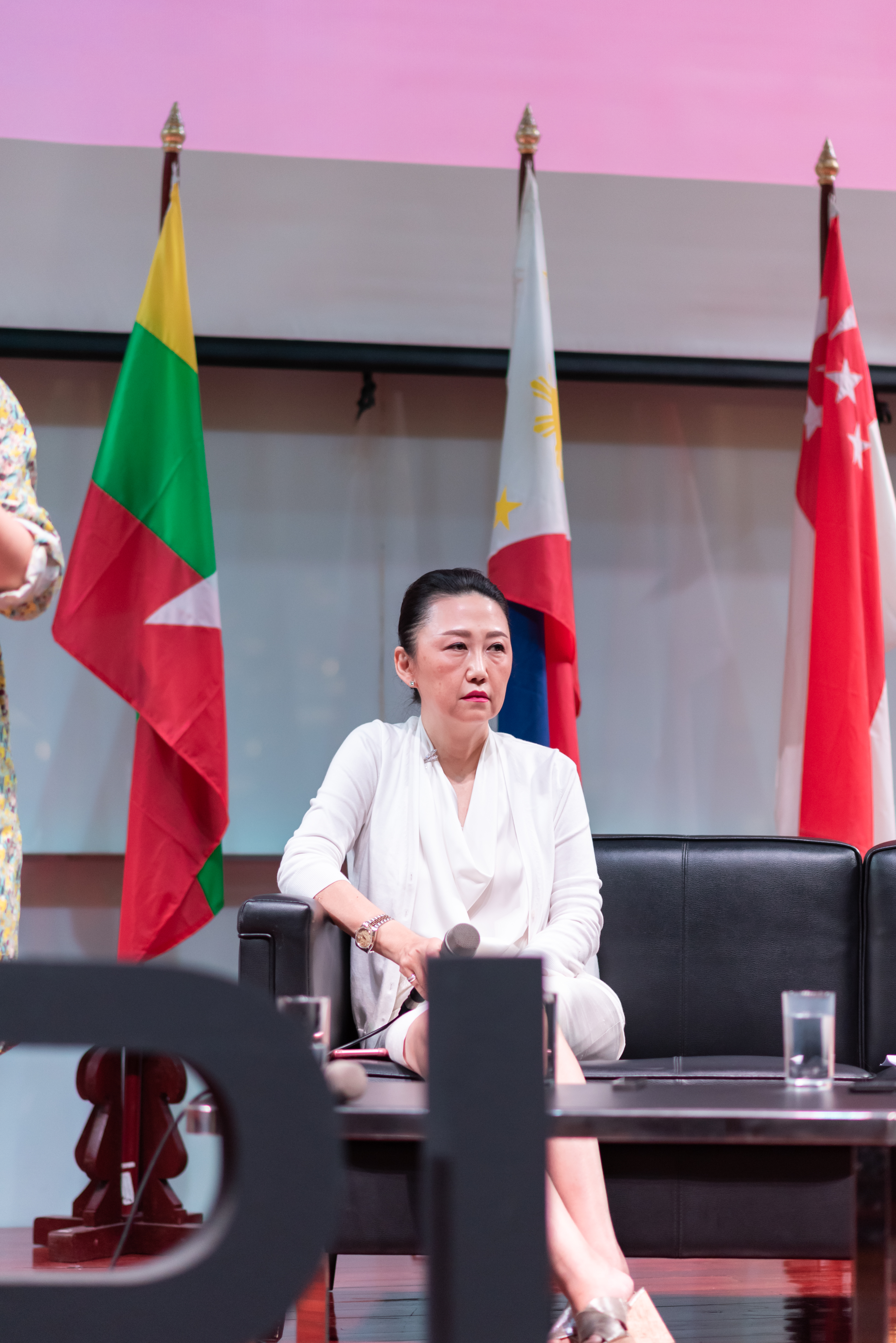 ถ่ายที่ห้องประชุมใหญ่อาคารเฉลิมราขกุมารี 60 พรรษา จุฬาลงกรณ์มหาวิทยาลัย ระหว่างที่วรรณี เจียรวนนท์ กำลังร่วมอภิปรายและเสวนากับเยาวชนผู้แทนประเทศในอาเซียน